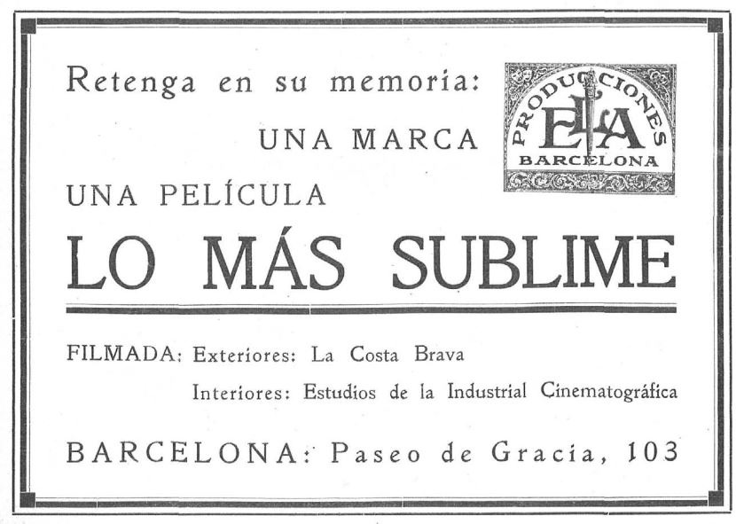 Publicitat del film Lo más sublime a la revista Popular Film , 21 de juliol 1927. Barcelona